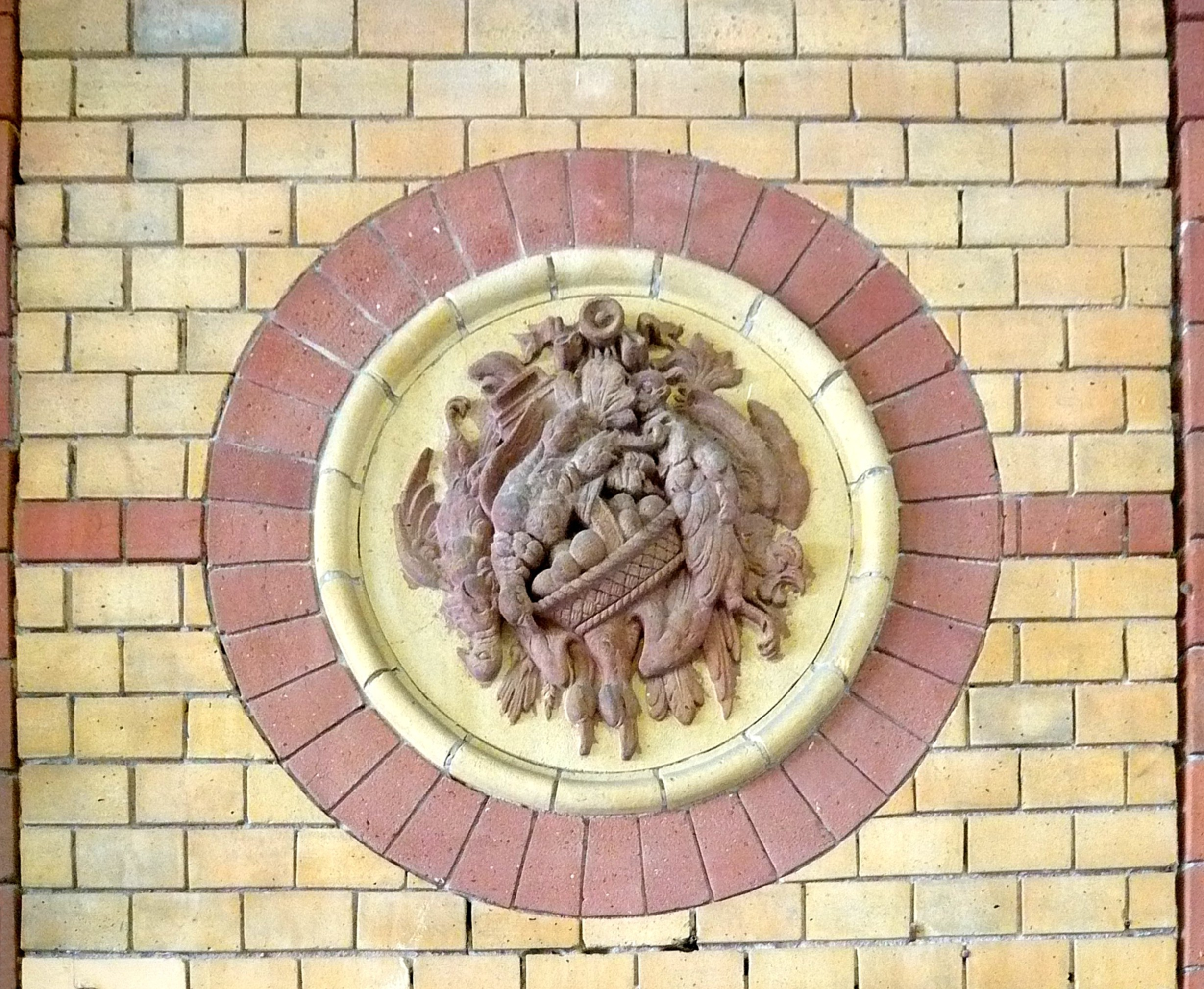 Berlin-Kreuzberg, Marheineke-Halle; innen (4), Medaillon "Meerestiere und Geflügel"